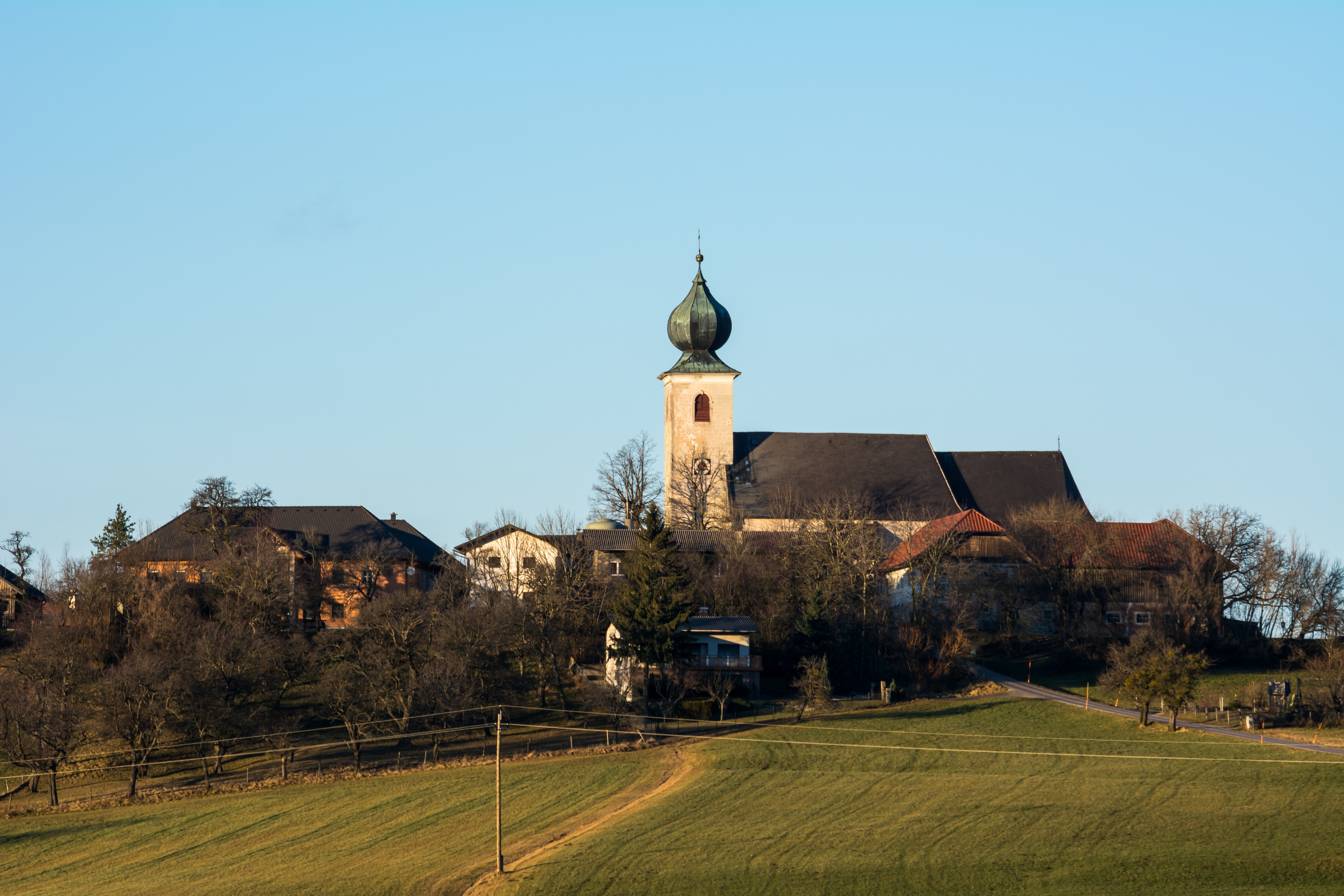 Kath. Pfarrkirche hl. Magdalena und Friedhof